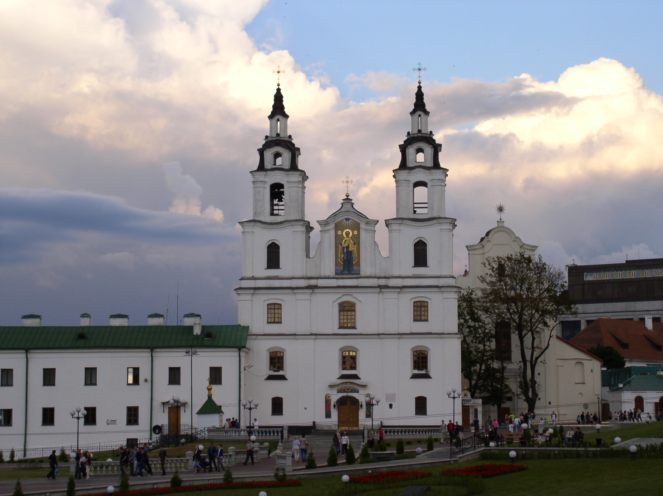 Cathedral of Holy Spirit, Minsk, Belarus.